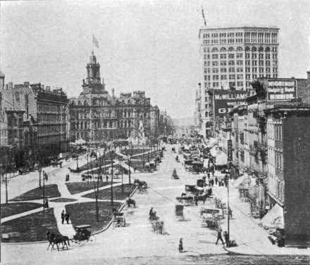 Cadillac Square Detroit 1899